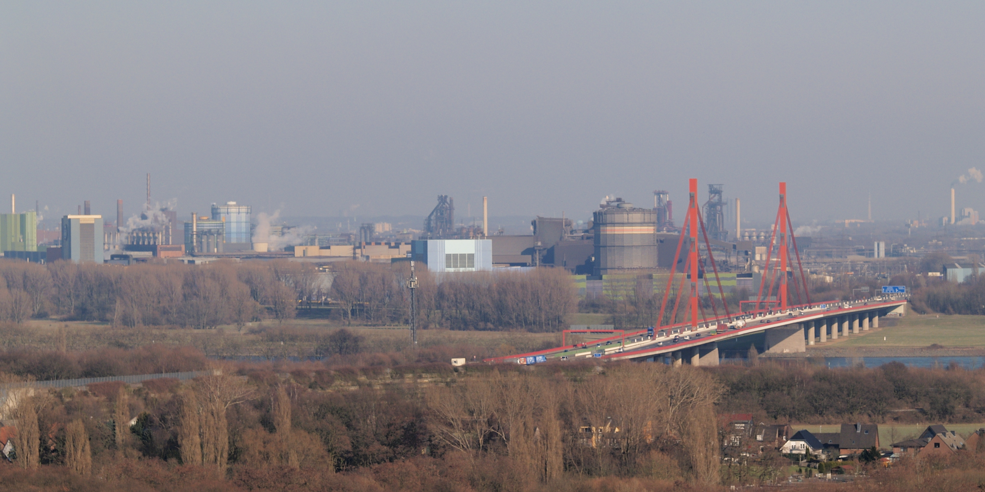 ThyssenKrupp Stahlwerk in Duisburg Bruckhausen, gesehen von der Halde Rheinpreussen in Moers